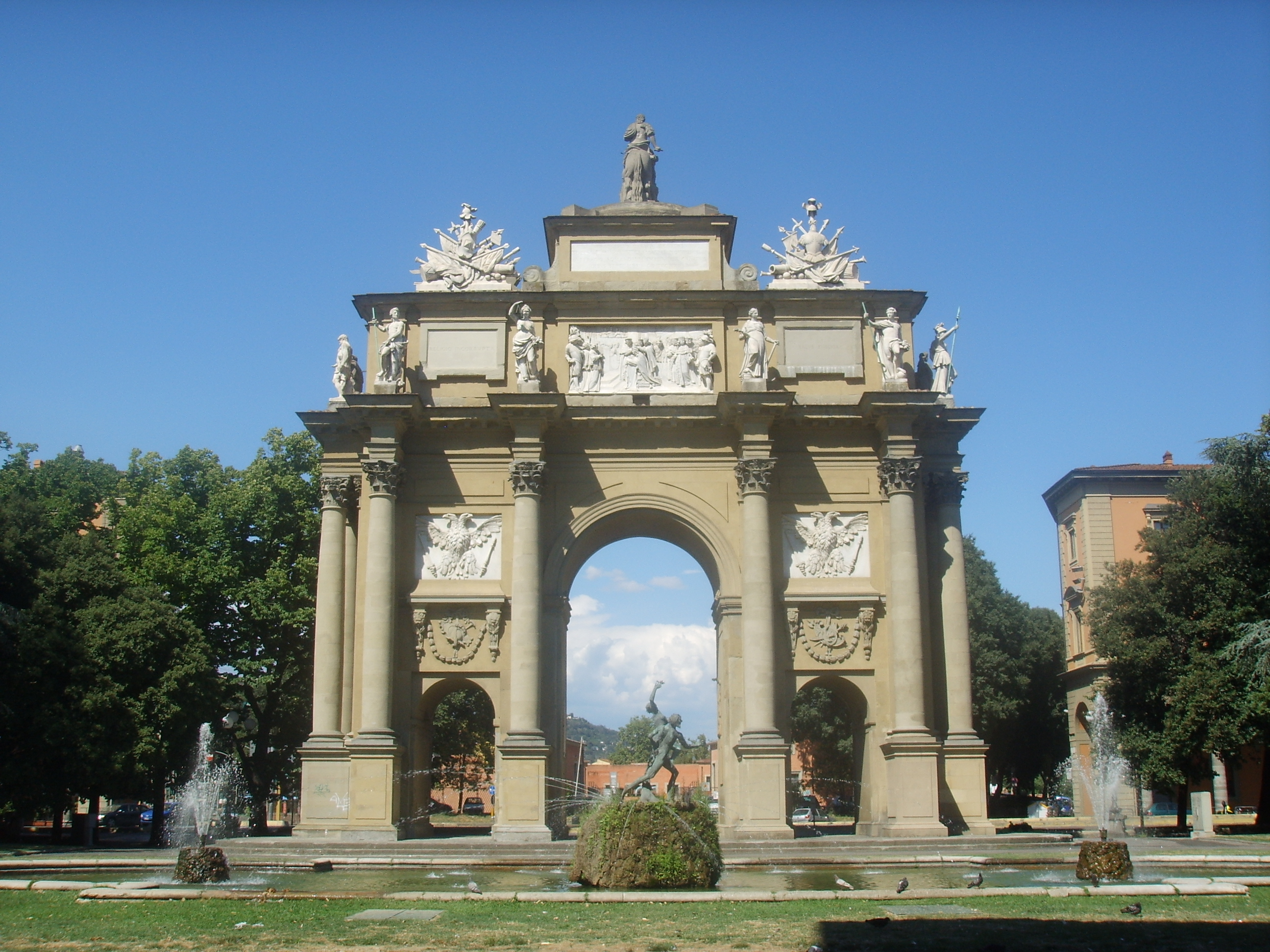 the Arch in Piazza della Libertà in Florence, italy